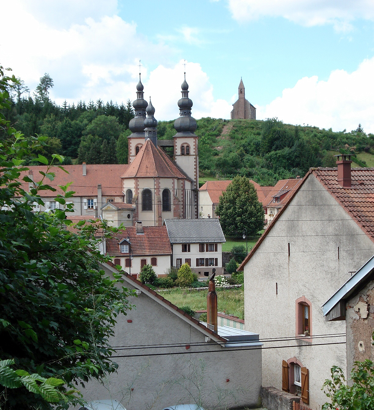 Saint-Quirin, dép. de la Moselle, France. Église prieurale (aujourd'hui paroissiale) Saint-Quirin, et (à l'arrière-plan, sur une butte) la Haute-Chapelle.